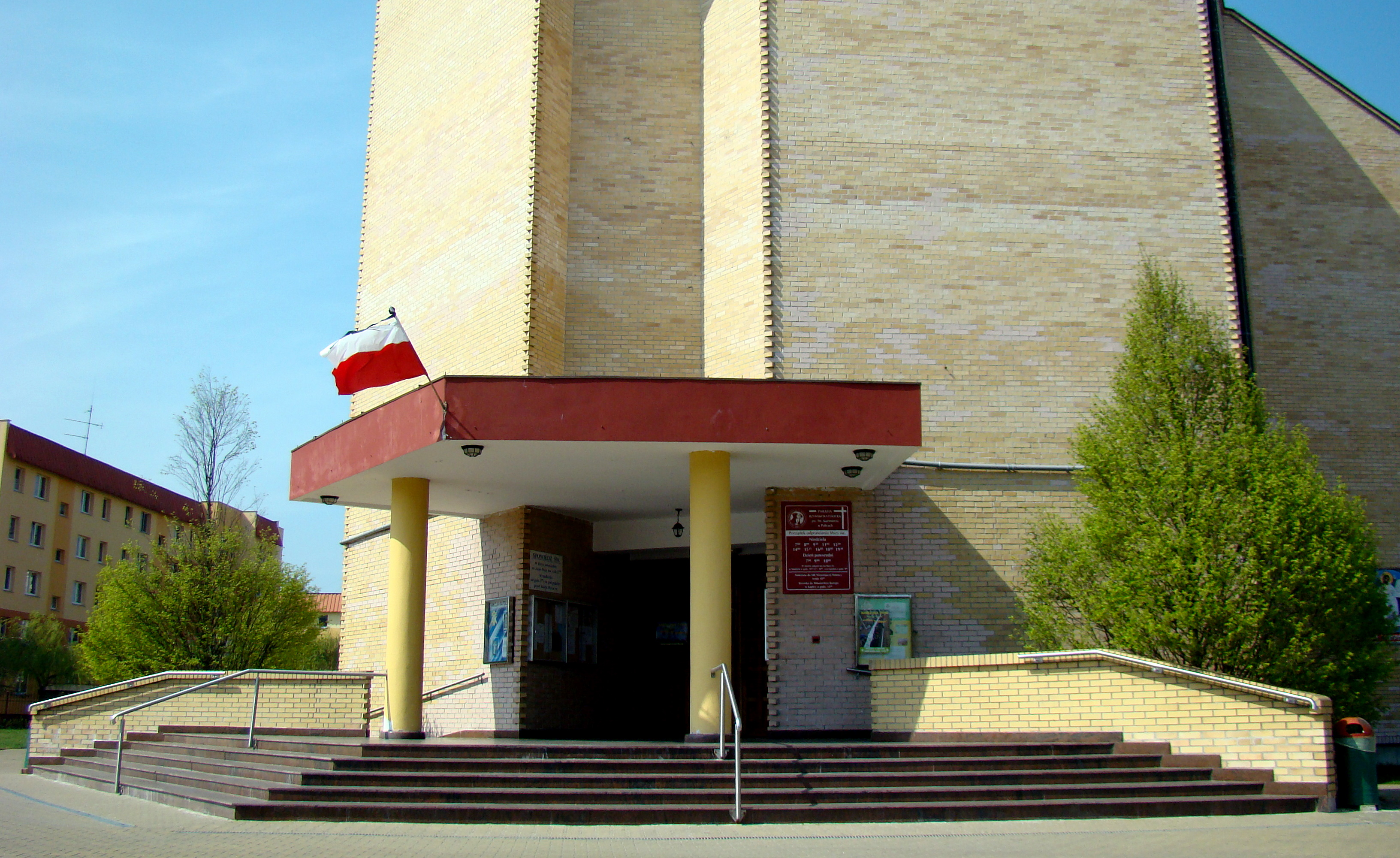 Kościół pw. św Kazimierza Królewicza w Policach (wejście główne), Polska